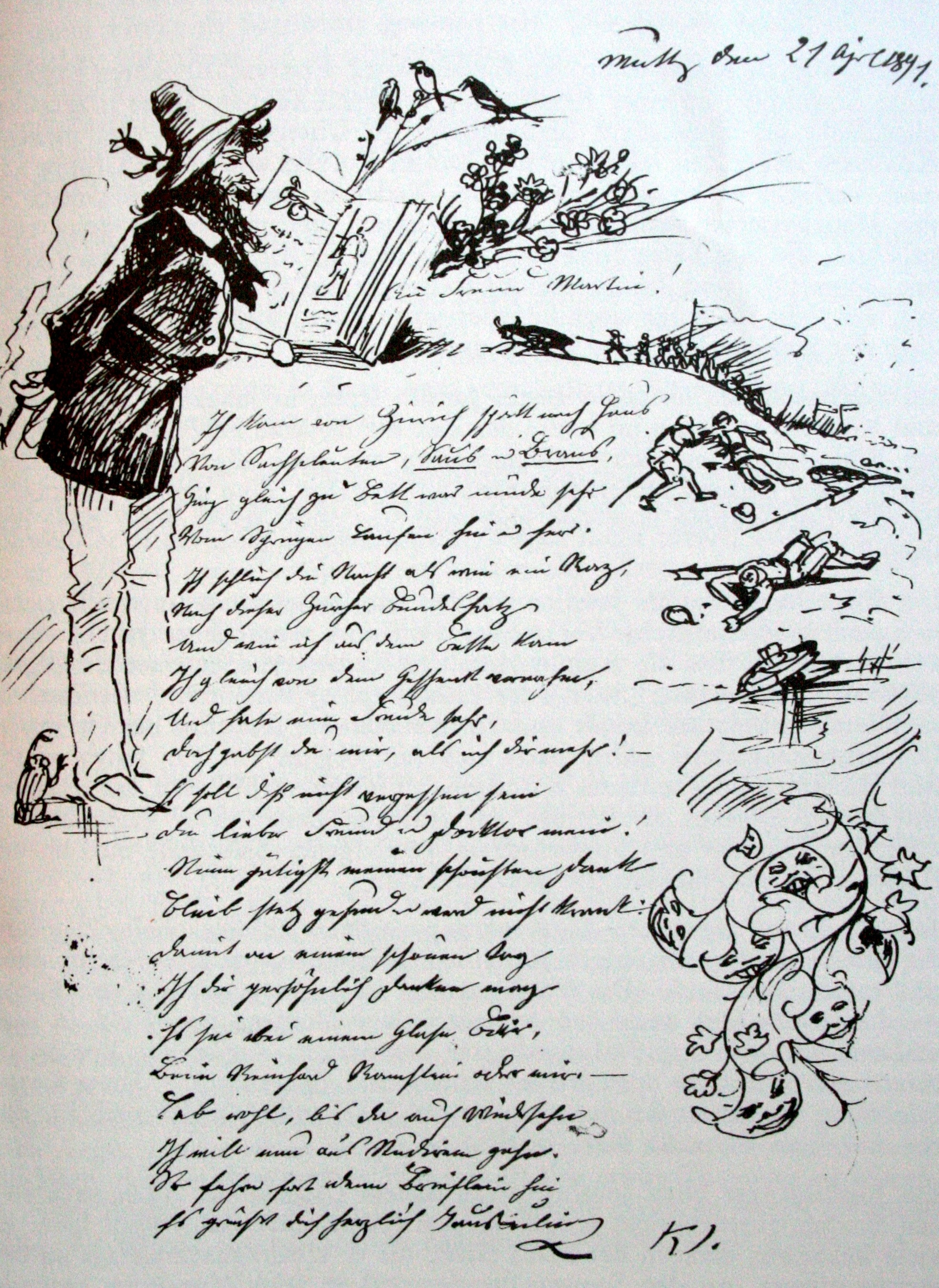 Brief von Karl Jauslin an seinen Freund Dr. Johannes Martin, Arzt in Pratteln. 21.5 x 17 cm, Privatbesitz